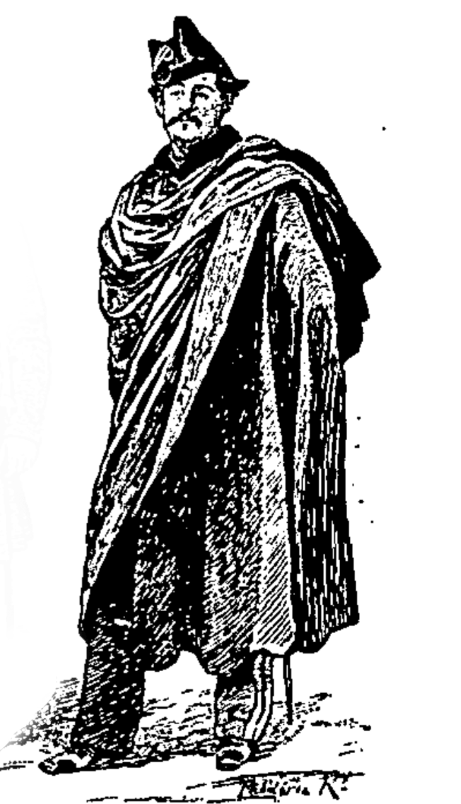 Cape espagnole nommé manteau à la chiroga ou Quiroga portée peu après 1824 à l'École polytechnique.